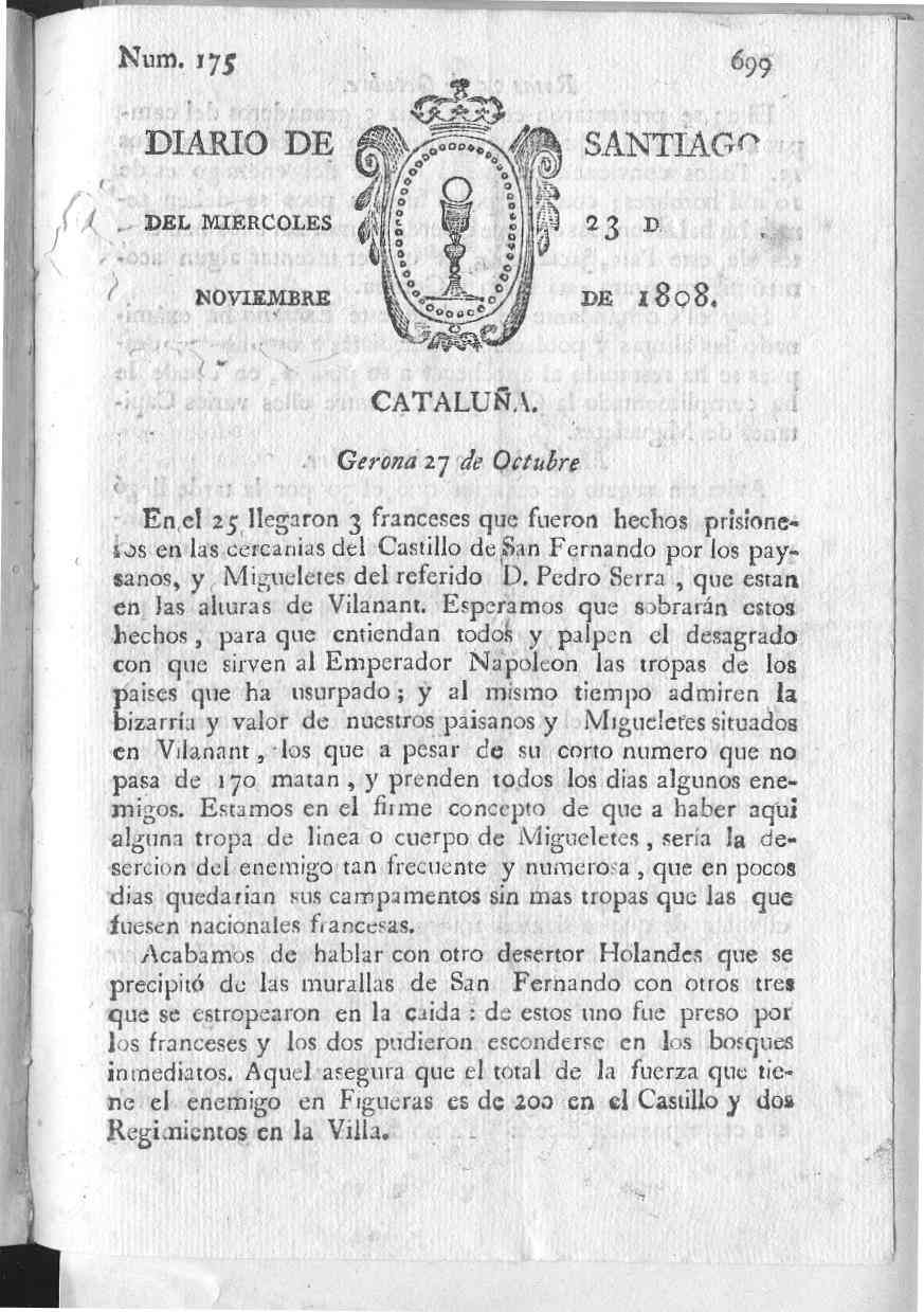 Número 175 do Diario de Santiago, o primeiro xornal de Galiza.